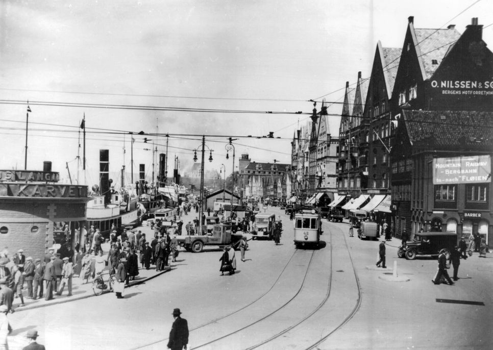 Trikken i Bergen tidlig på 1900-tallet, ved Torgallmenningen